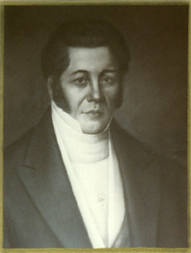 Don José Rudecindo Rojo y Frias, gobernador de San Juan